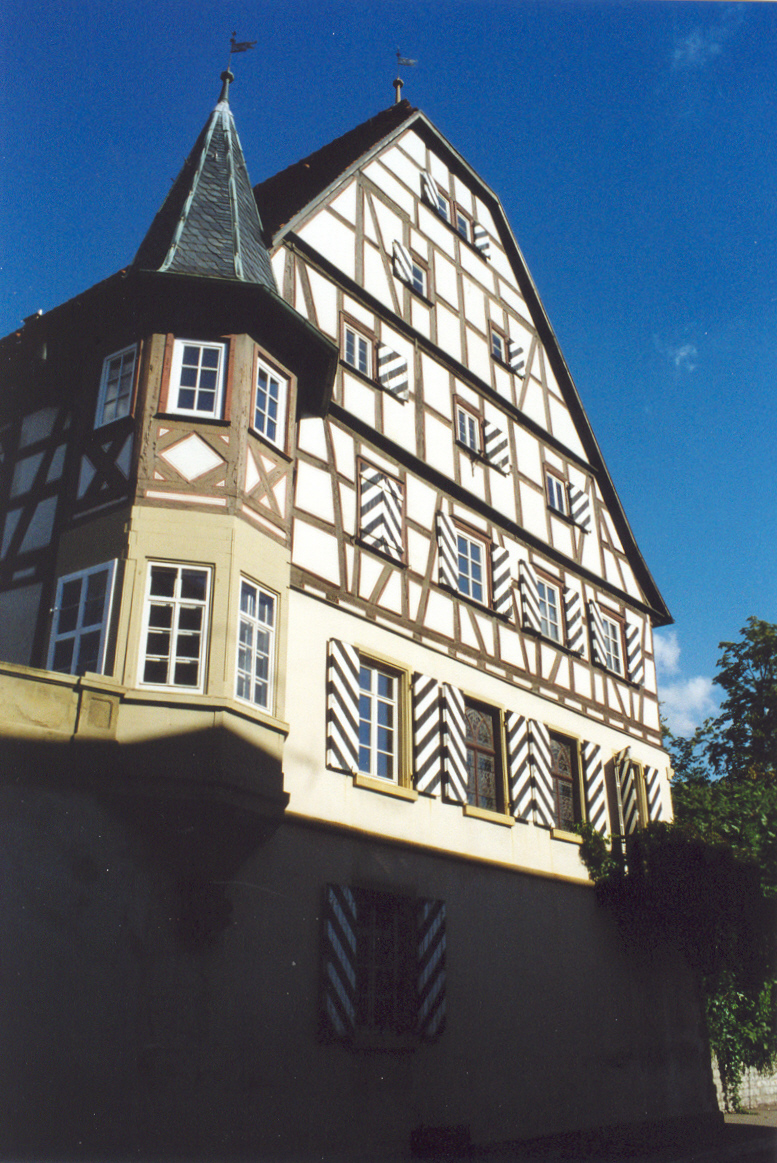 Adelsheimer Oberschloss am Rande des historischen Kernes. Beeindruckender, voluminöser Fachwerkbau mit polygonalem Eckerker.